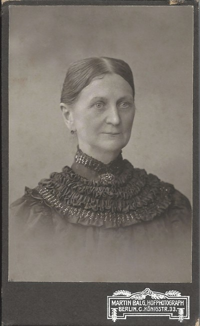 Porträt einer reifen Frau (Carte de Visite, 63 mm × 103 mm, auf dunklem Karton, von Martin Balg, Berlin, Königsstraße 33).